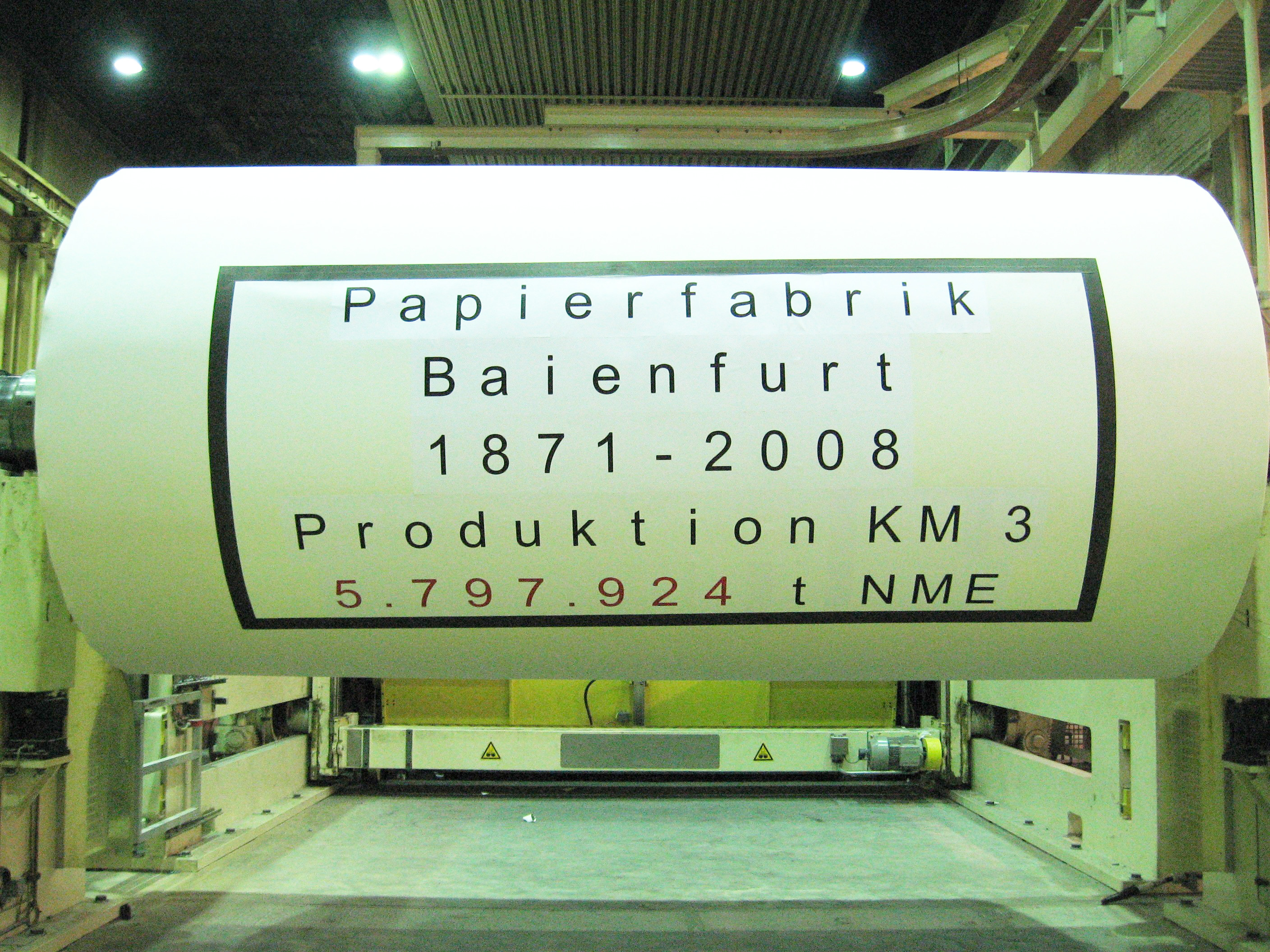 Letzter Tambour der Papierfabrik Baienfurt